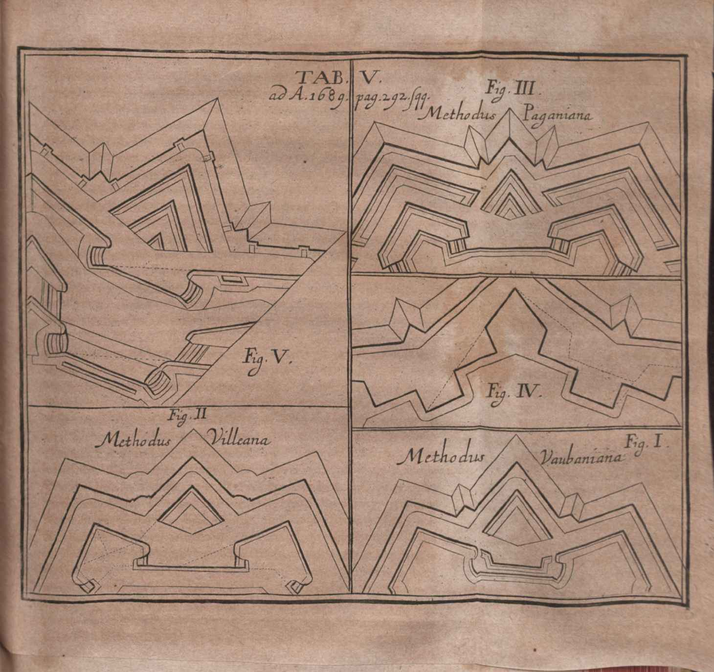 Illustration